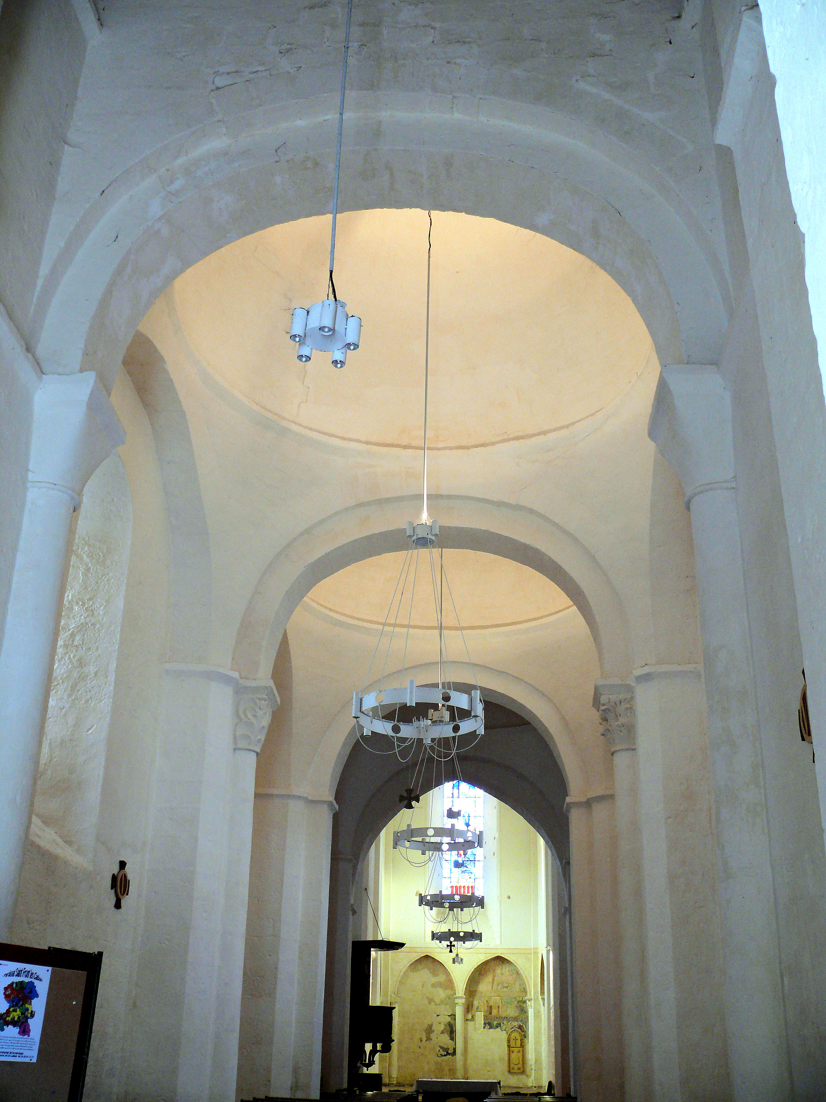 Trémolat - Eglise Saint-Nicolas - Nef couverte par une file de trois coupoles